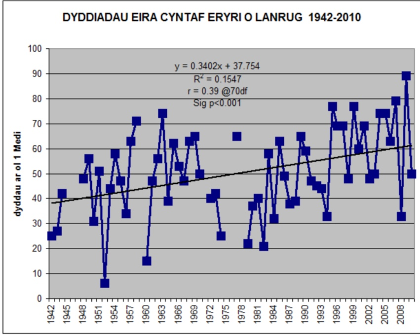 Graff yn dangos y duedd i eira ddisgyn ar y Carneddau yn hwyrach (data Les Larsen gyda chaniatad)